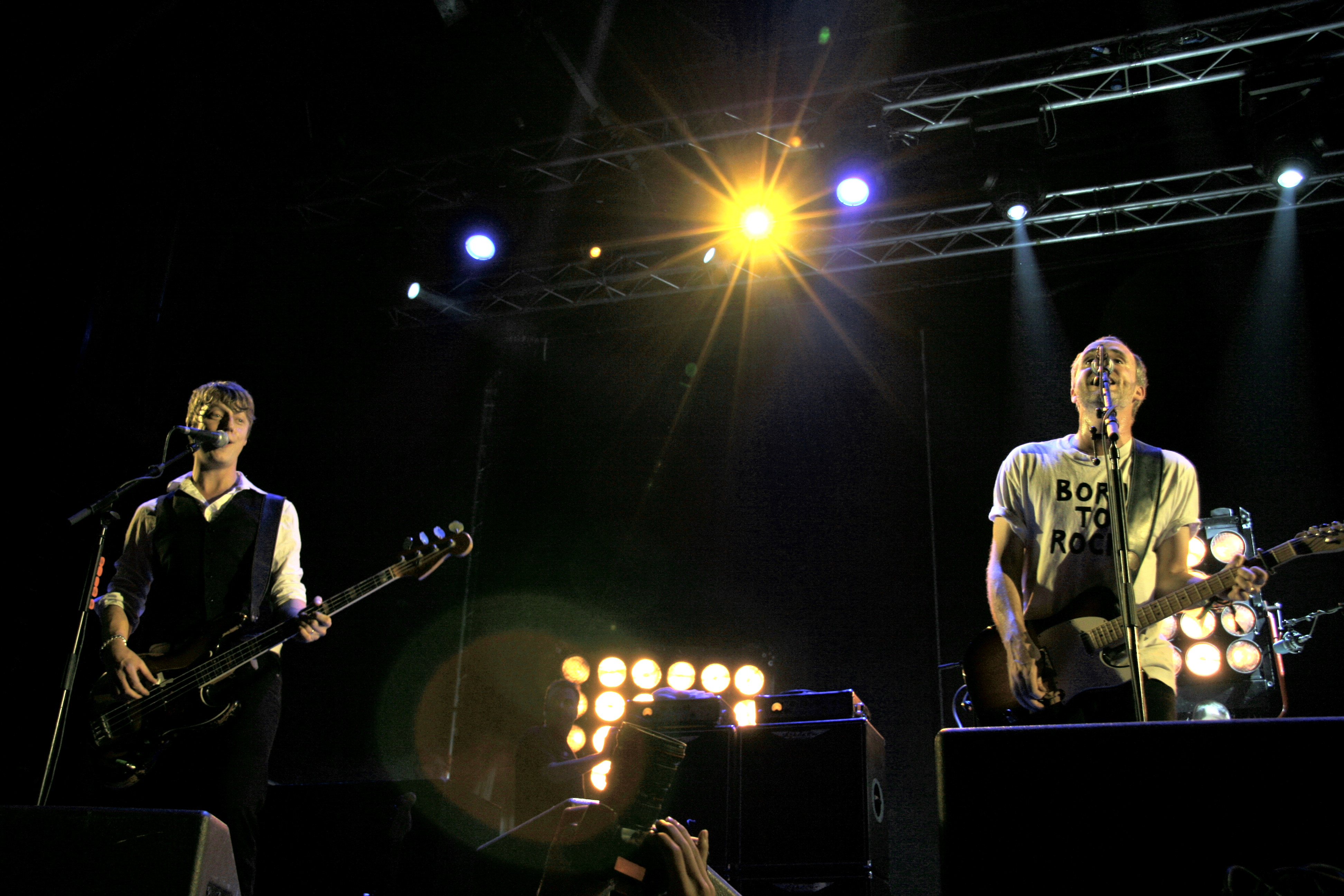 Travis en la antigua Fábrica Damm de Barcelona